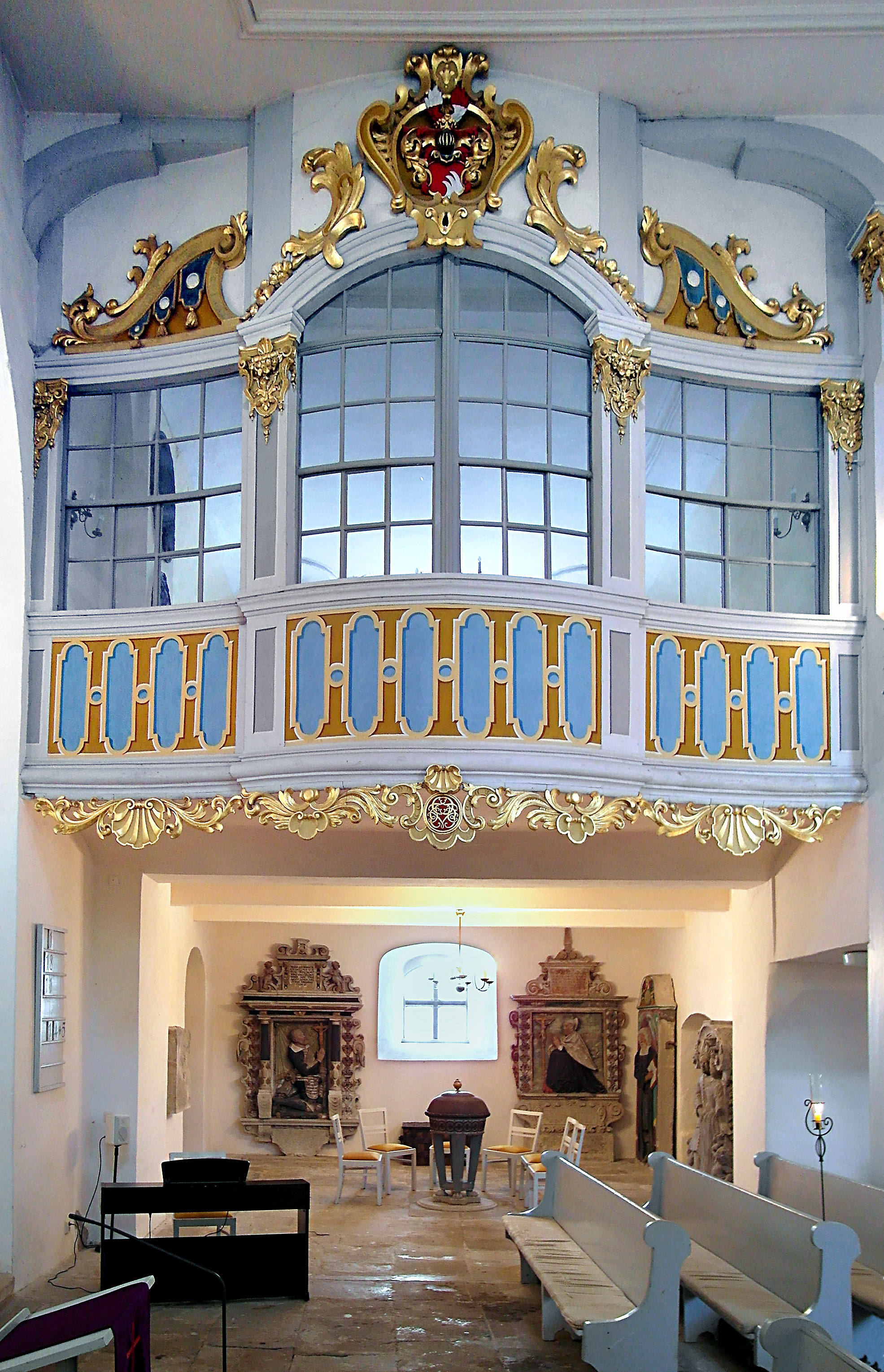 Kirche Reinhardtsgrimma (GMP:50.893779,13.753364), Patronatsloge